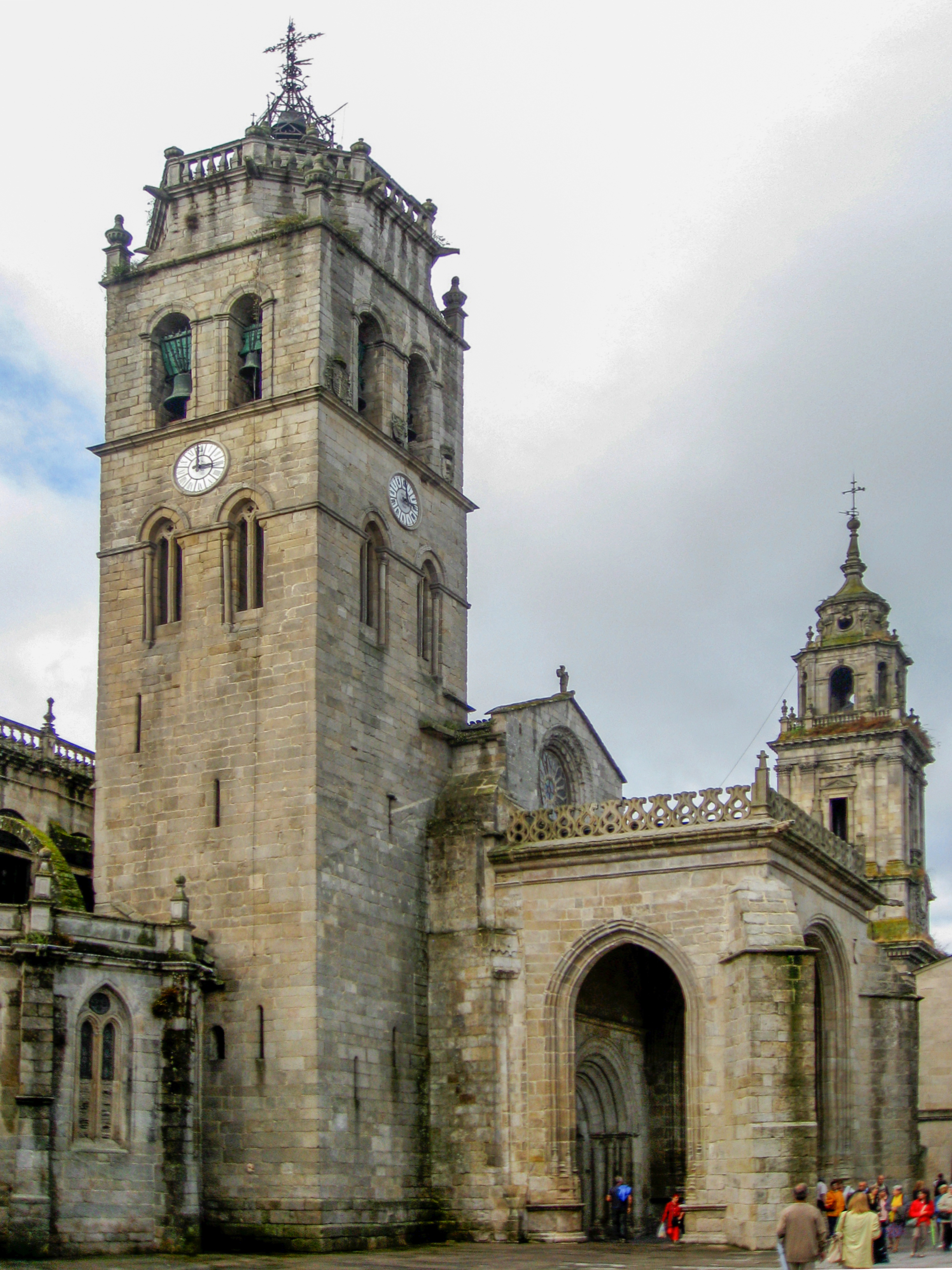 CAtedral de Lugo, torre e fachada.